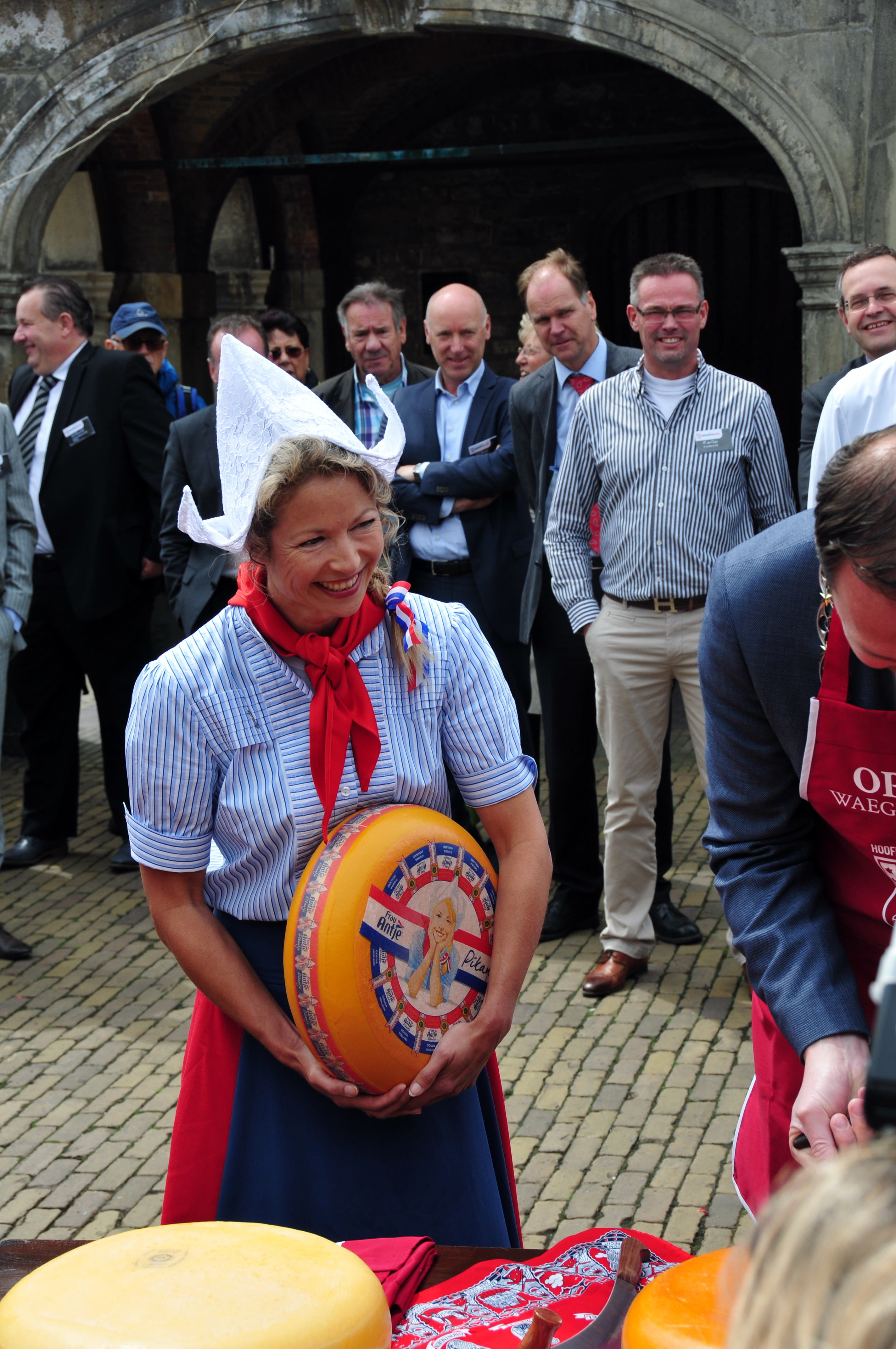 Gouda, Niederlande, Stadtzentrum